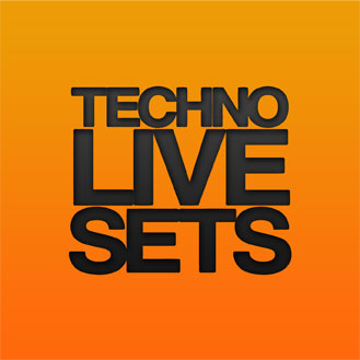 Logo de Techno Live Sets